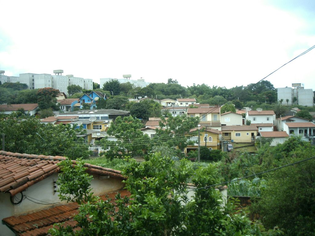 Jardim Pacaembu, Campinas, SP, Brasil